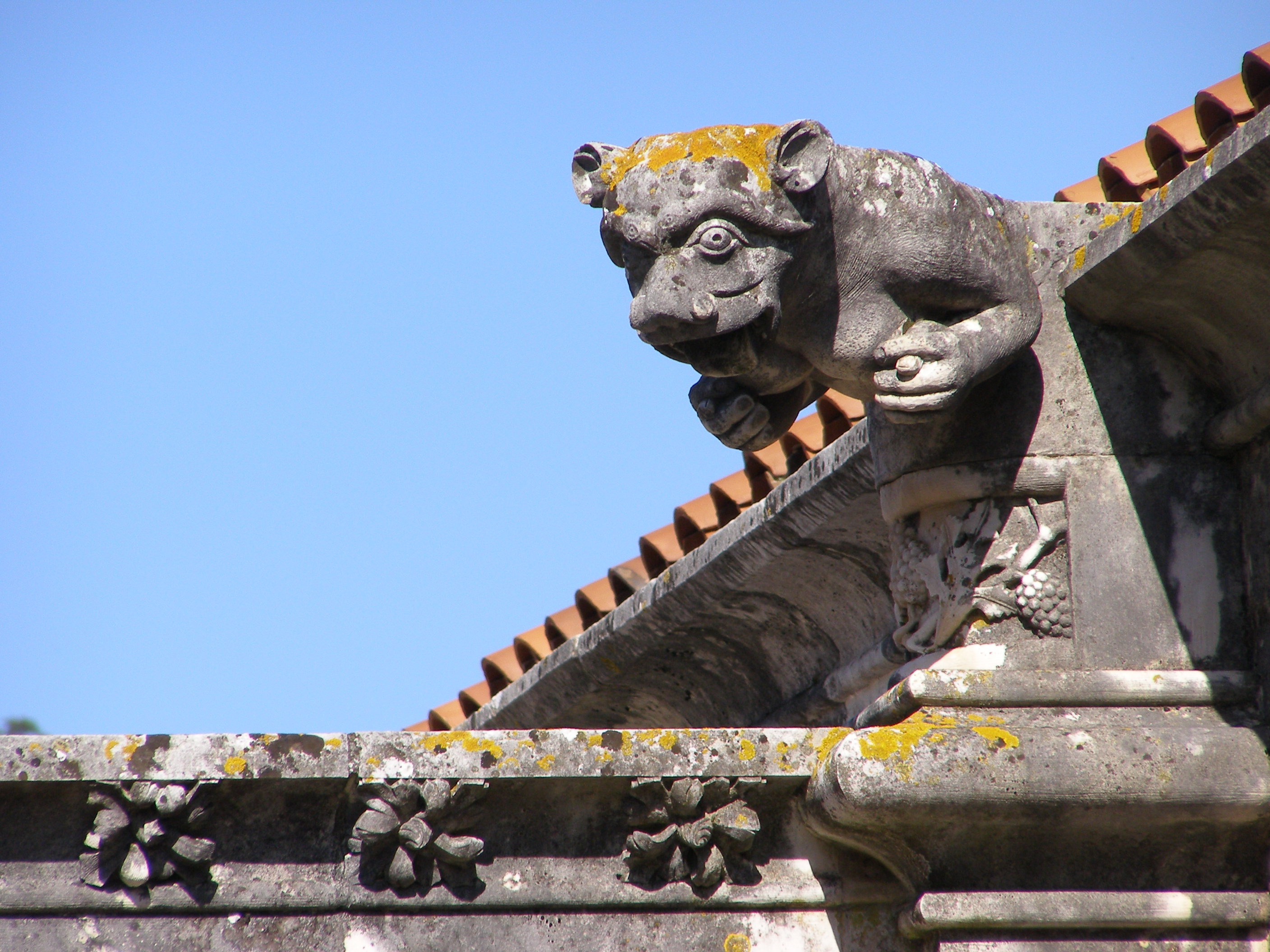 Gargoyle, Monastery of Alcobaça, Alcobaça, Portugal.